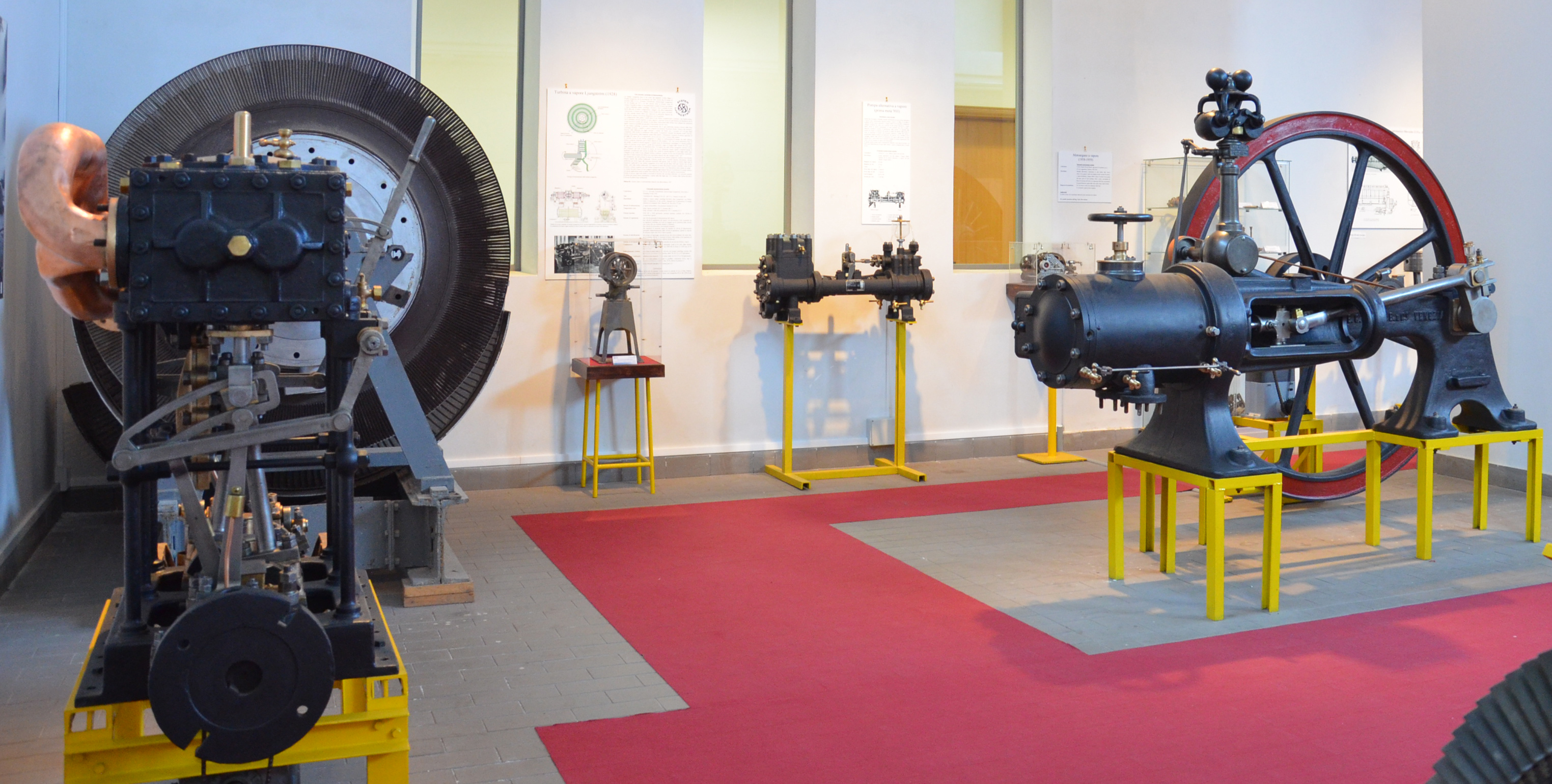 La sala dei motori a vapori del Museo dei Motori